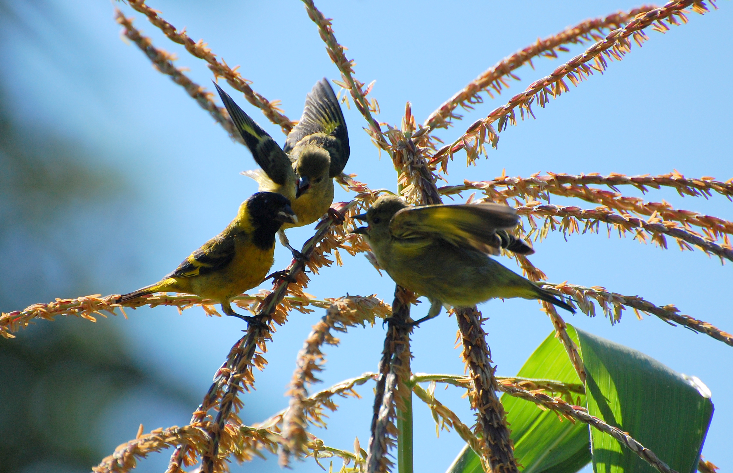 EPR - VIVEIRO DE MUDAS NATIVAS - Fazenda Vô-Vó - Piraju-SP .br